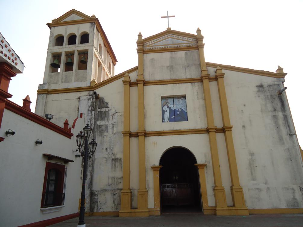 san Francisco iglesia León, Nicaragua por Richard Weiss